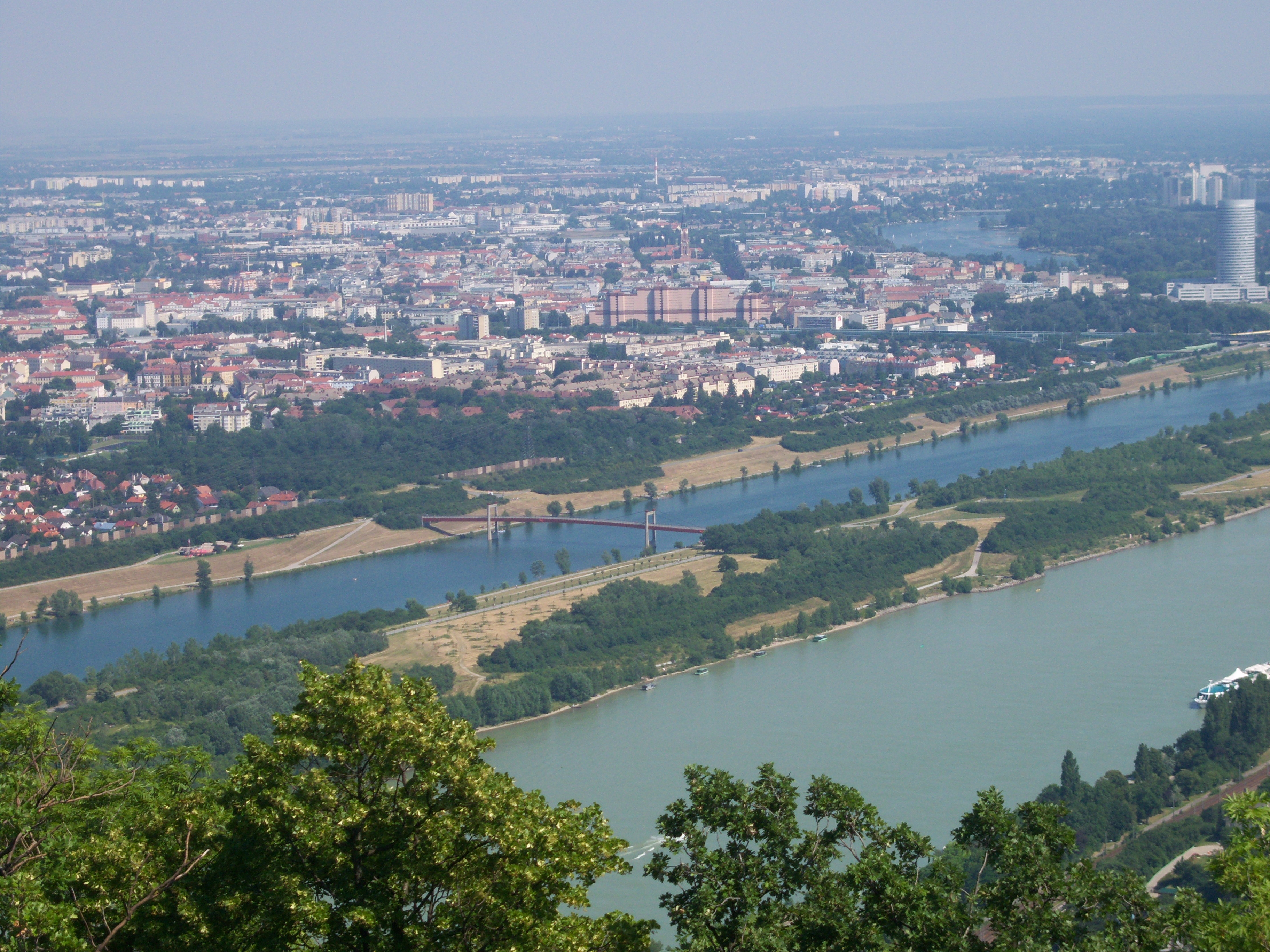 Blick vom Leopoldsberg auf die Jedleseer Brücke